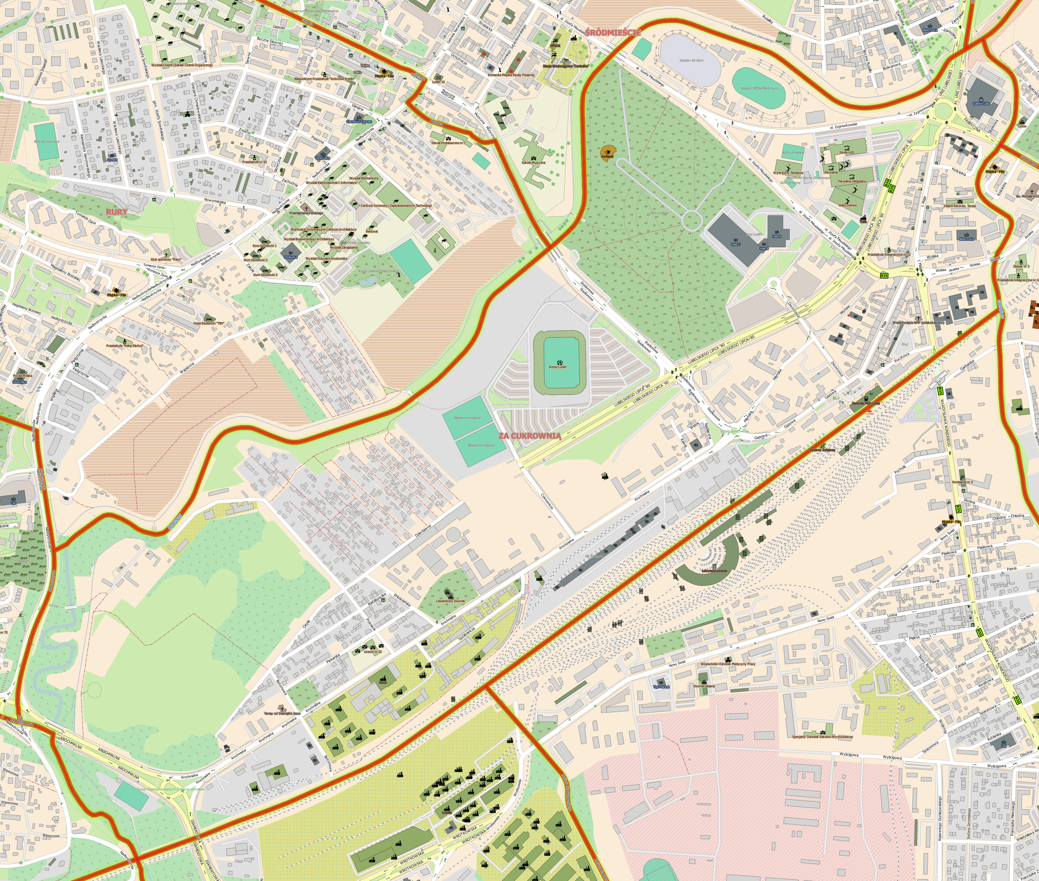 Plan dzielnicy Za Cukrownią w Lublinie.